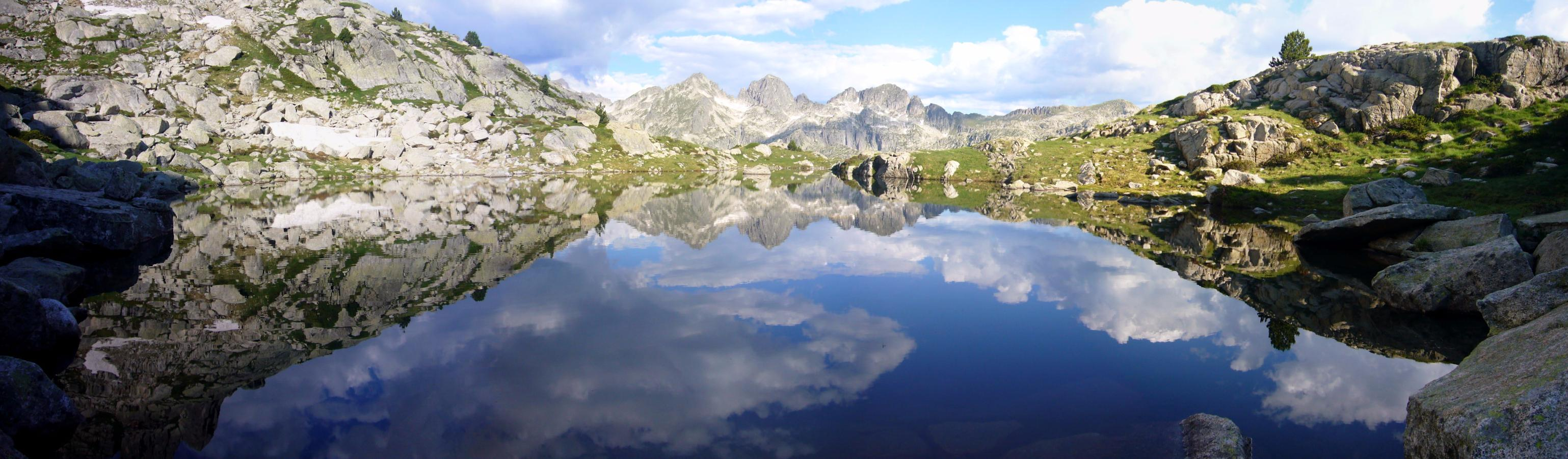 Estanyet de l'Obaga d'Estany Negre; la Vall de Boí, Alta Ribagorça, Catalunya